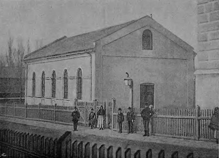 Wybudowany w latach 1891-1892 gmach C. K. Gimnazjum Arcyksiężniczki Elżbiety w Samborze.